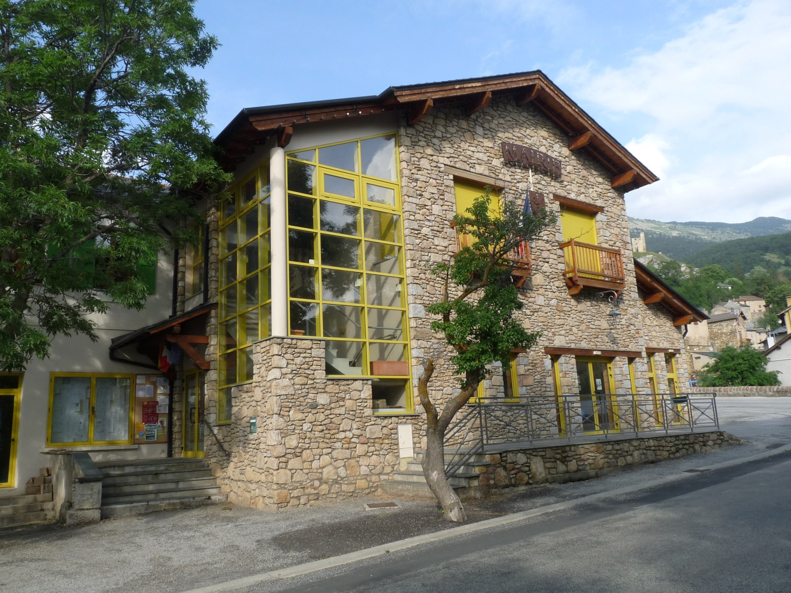 Mairie de Llo, Pyrénées-Orientales, France